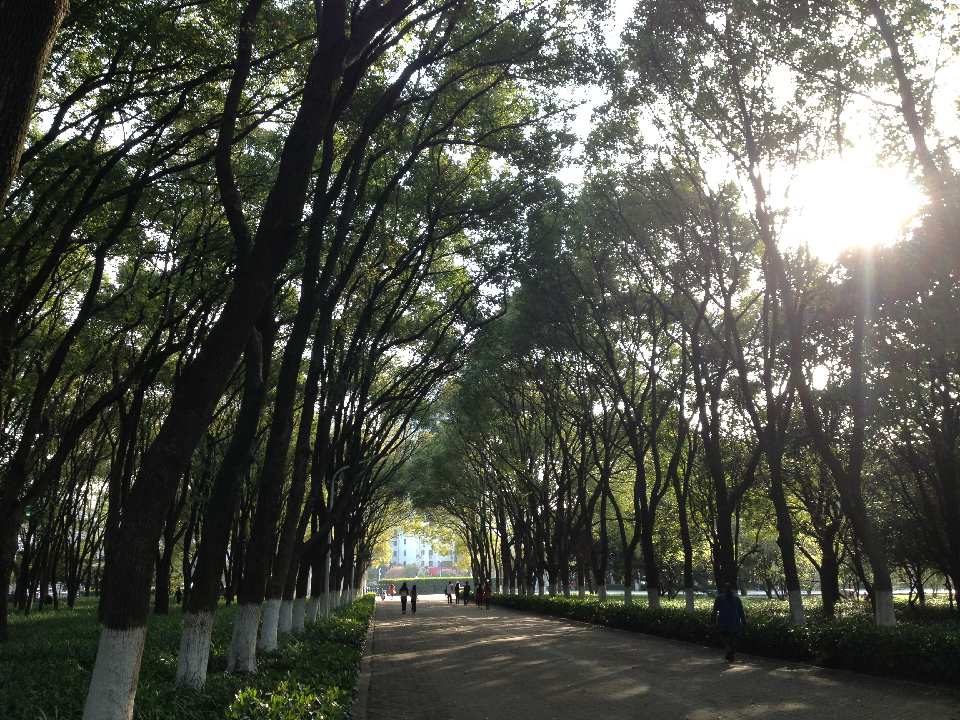 通向南一门的路